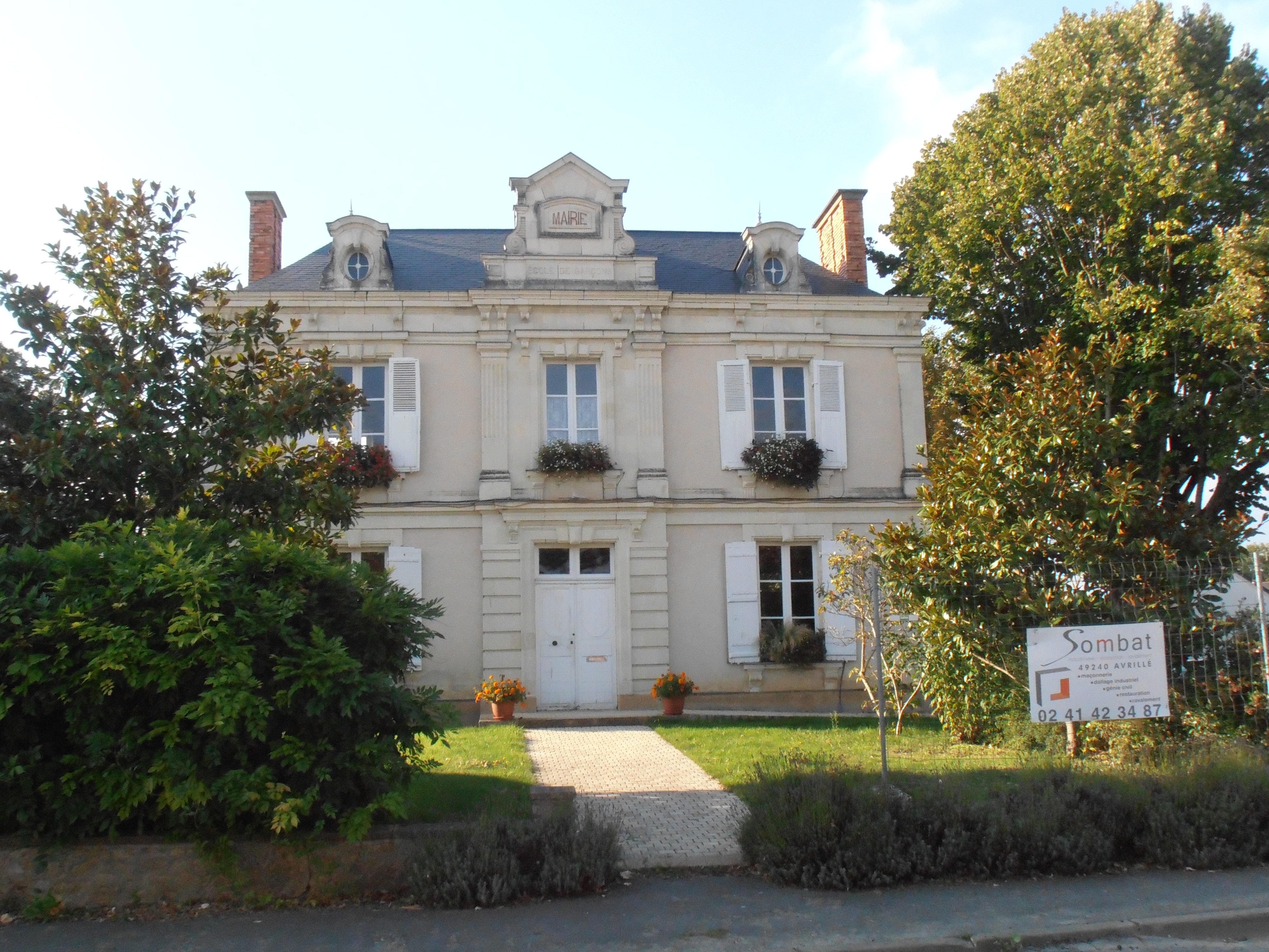 La mairie de Contigné (Maine-et-Loire, France).